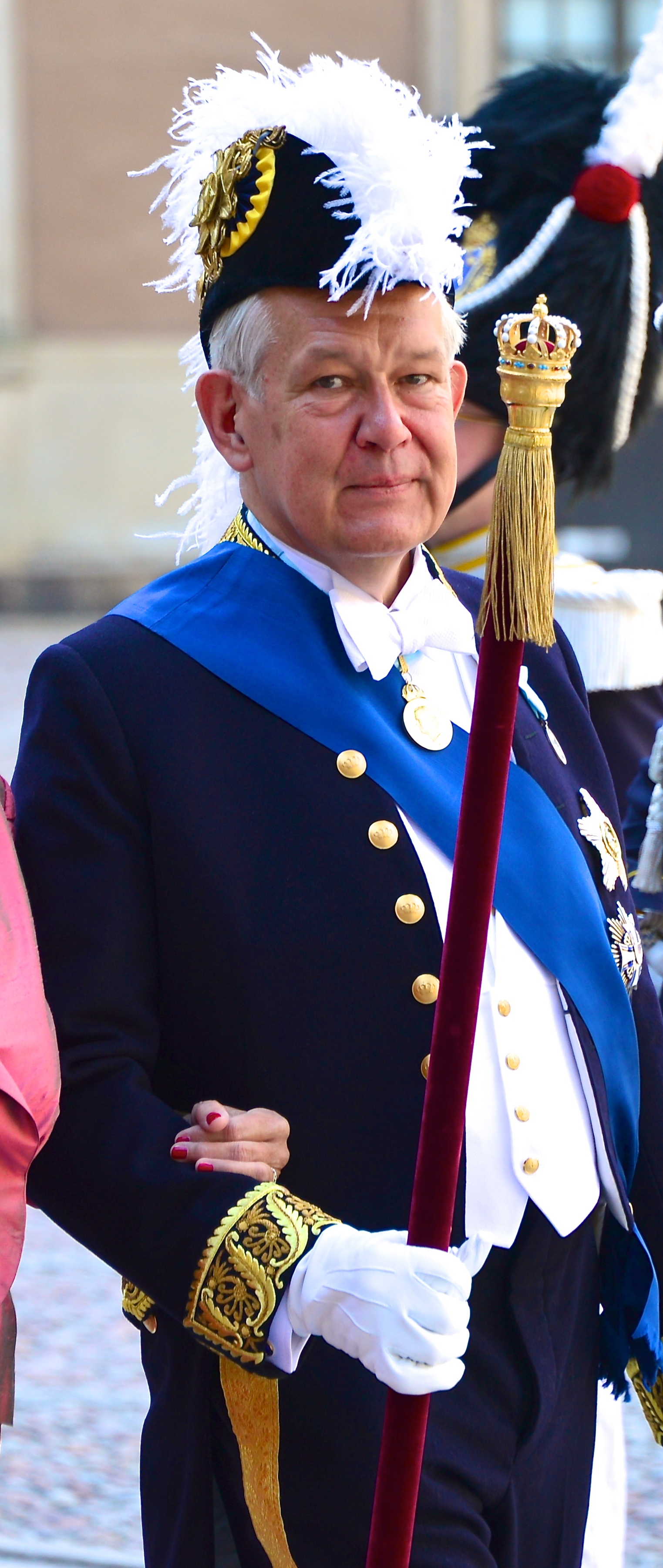 Riksmarskalk Svante Lindqvist iklädd hovuniform på prinsessan Madeleines bröllop 8 juni 2013.